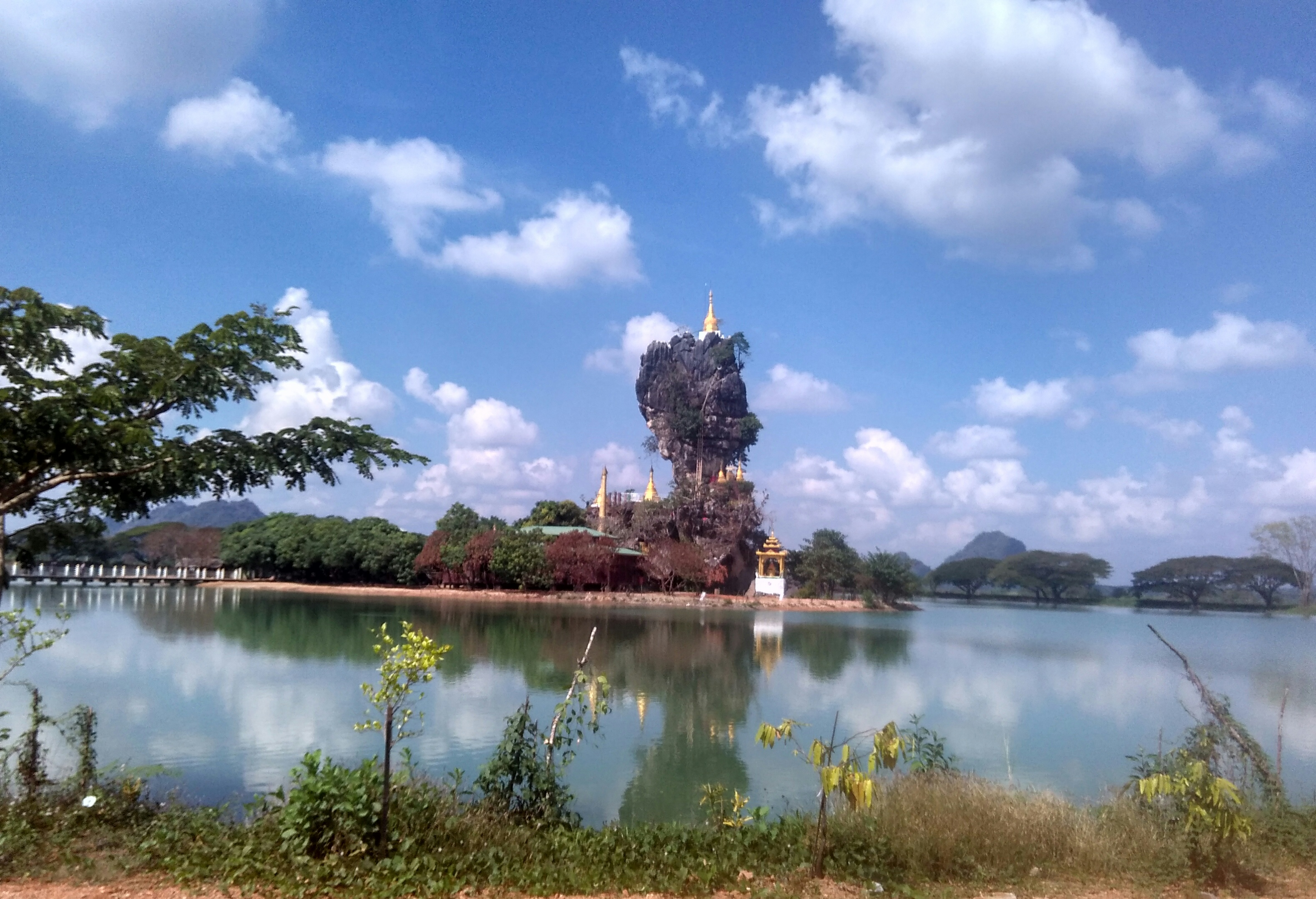 မြန်မာဘာသာ: ကျောက်ကလပ်စေတီတော်။ စေတီတည်ရှိရာ ကန်ဘောင်မှ ရိုက်ကူးသည်။ နိုဝင်ဘာလ ၁၉ ရက်၊ ၂၀၁၇ တွင် ရိုက်ကူးခဲ့သည်။